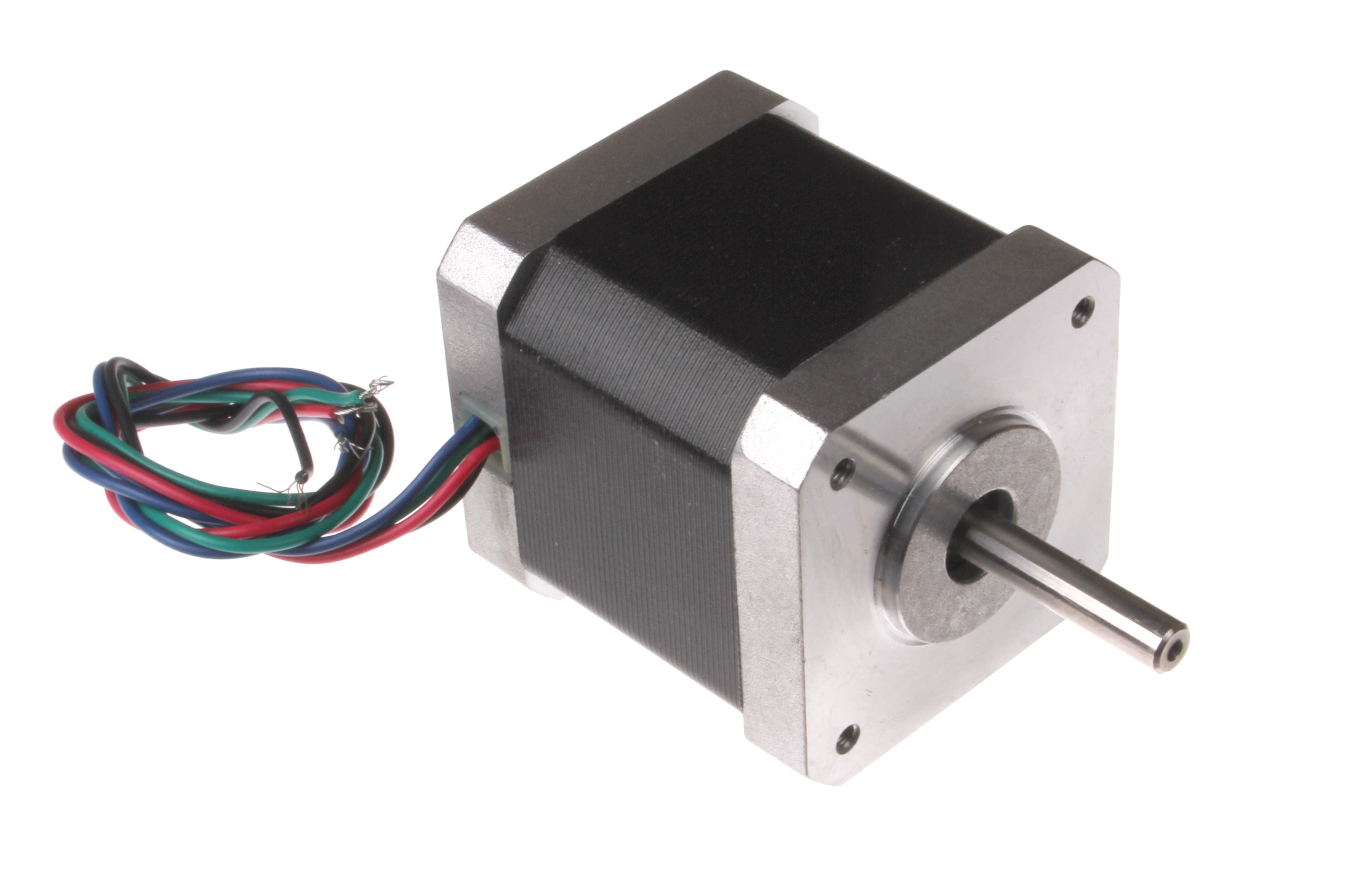 Nema 17 Stepper Motor.